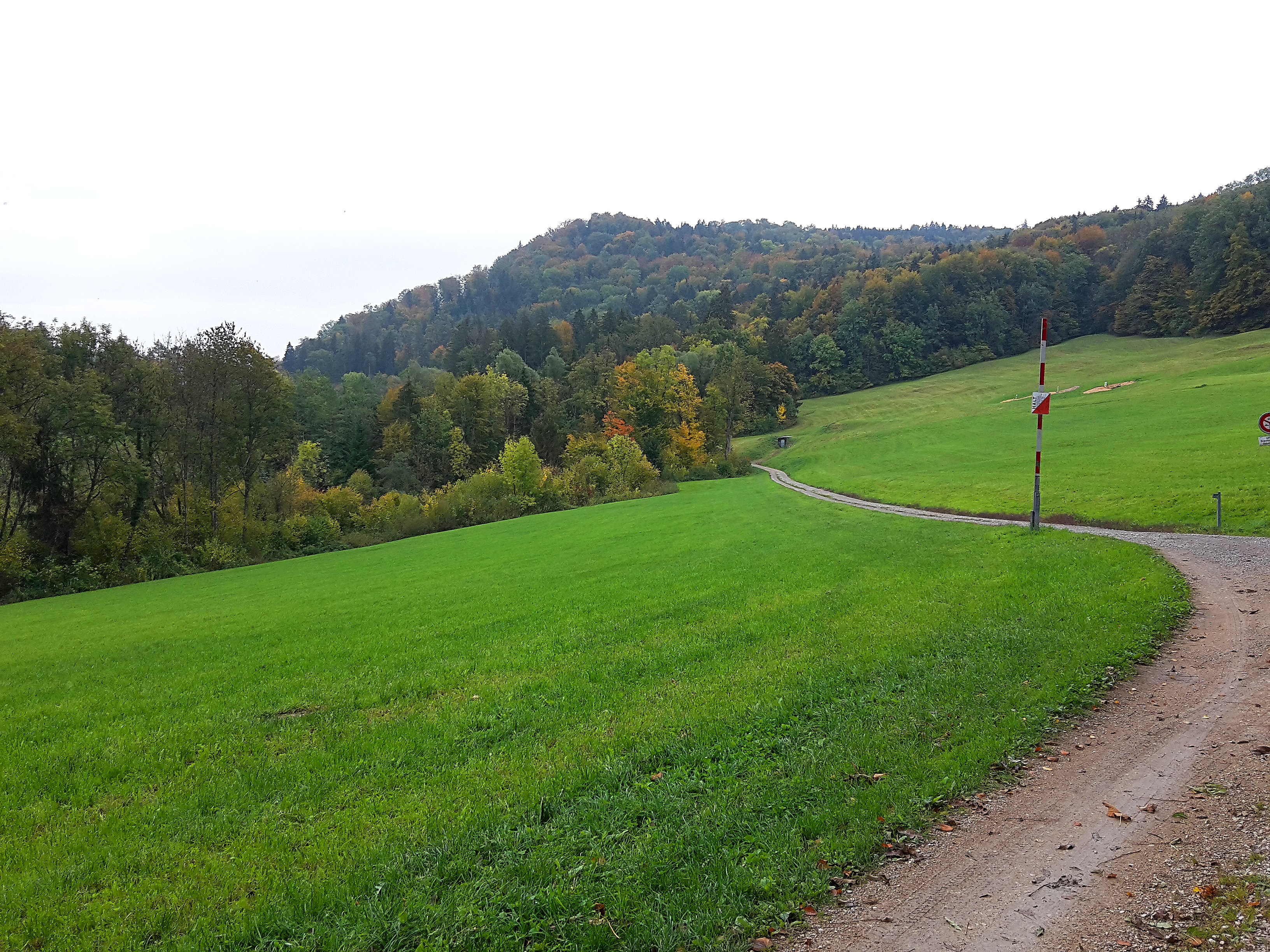 Blick ins Reppischtal nahe Reppischhof in der Gemeinde Bergdietikon mit dem 586 Meter hohen Hohbüel